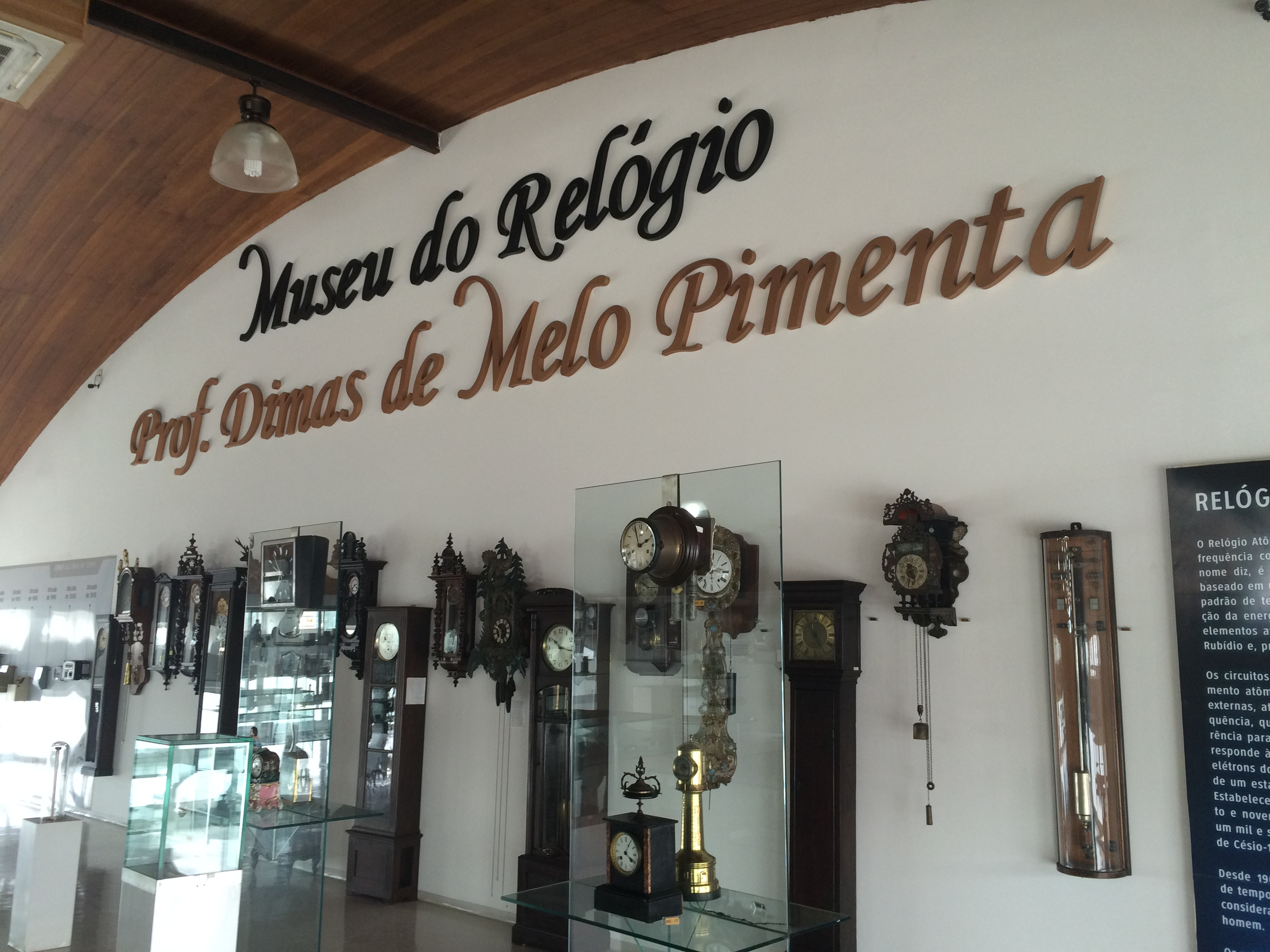 Interior do Museu do Relógio prof. Dimas de Melo Pimenta, parede principal, em São Paulo (SP), Brasil.